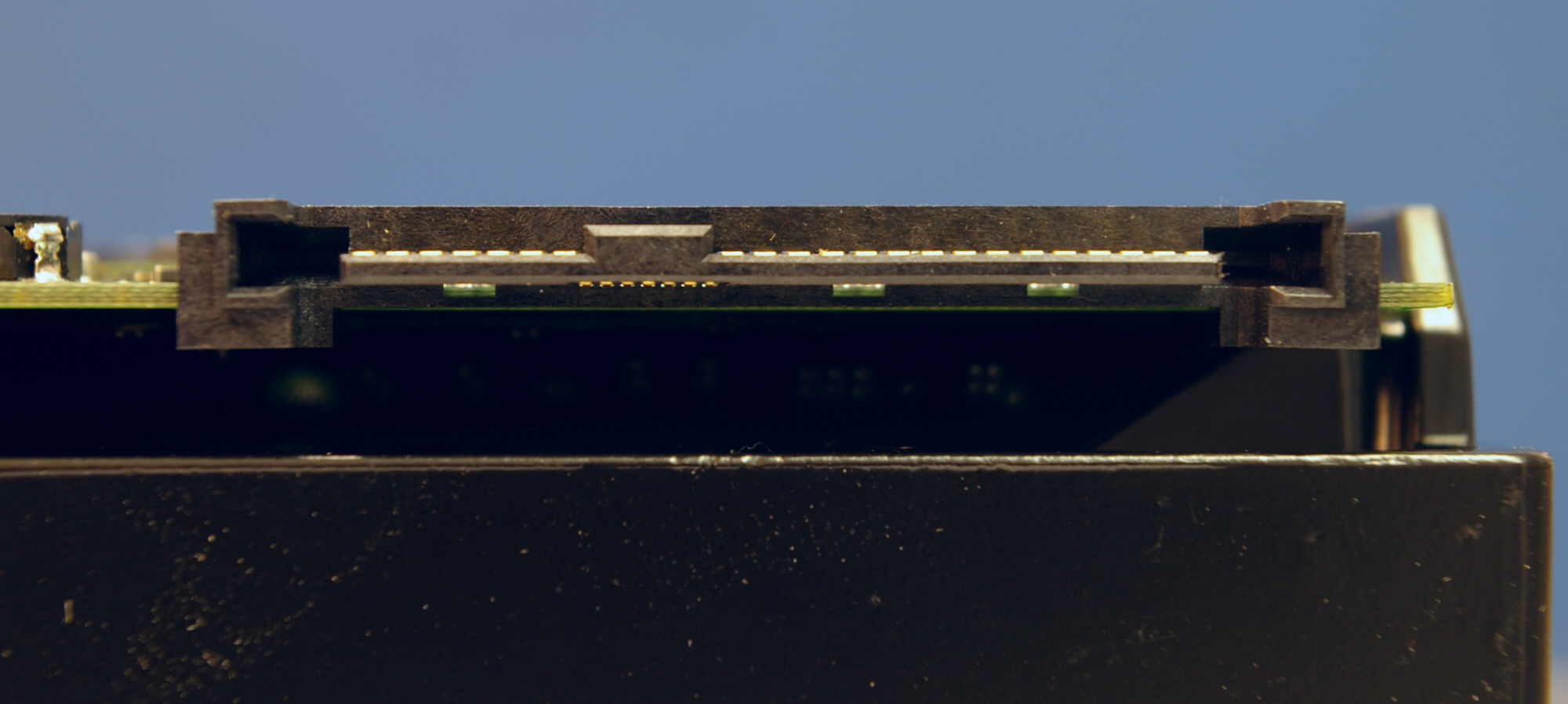 Anschlussleiste SAS-Festplatte